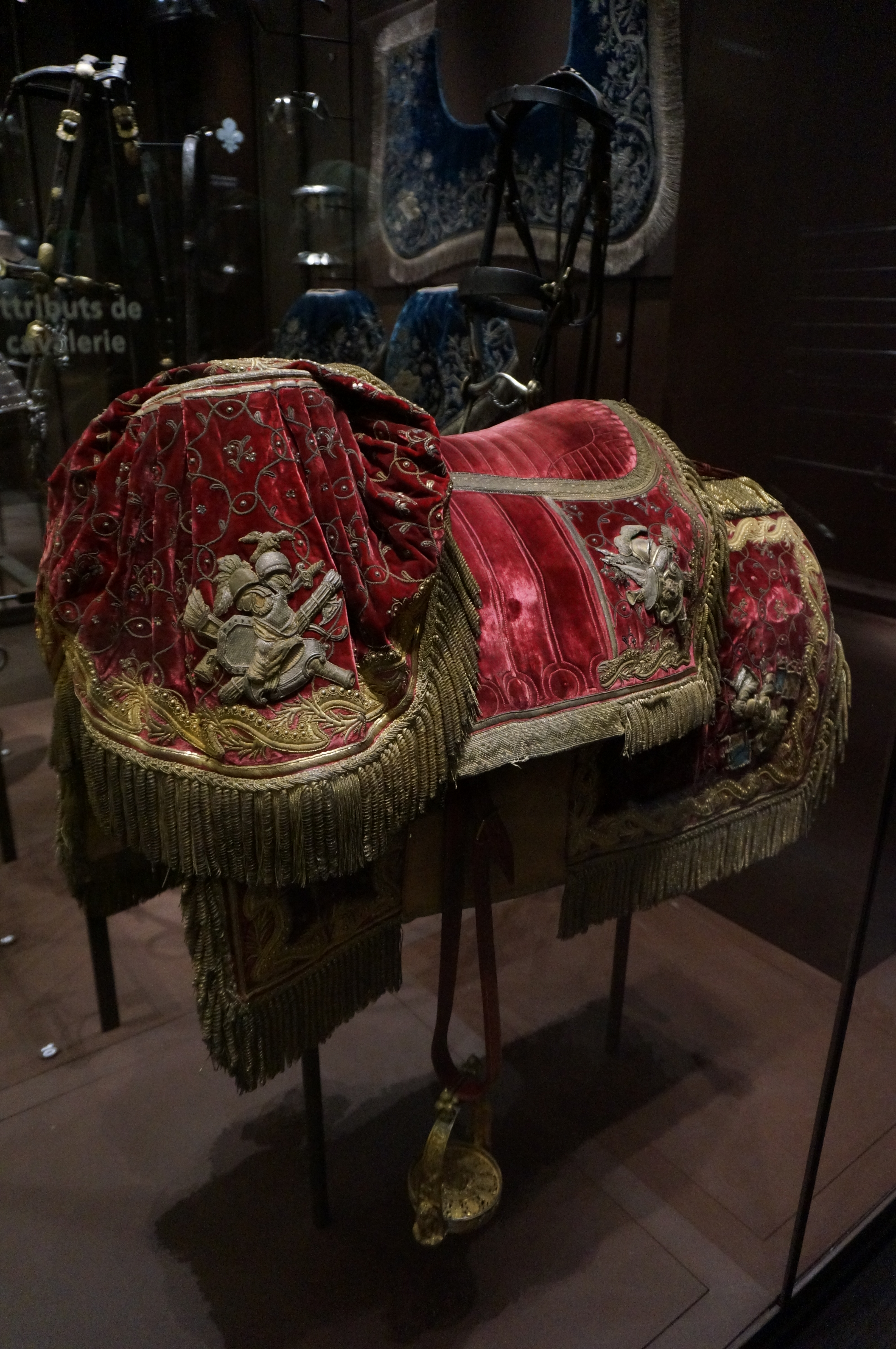 Collections of Musée de l'armée.